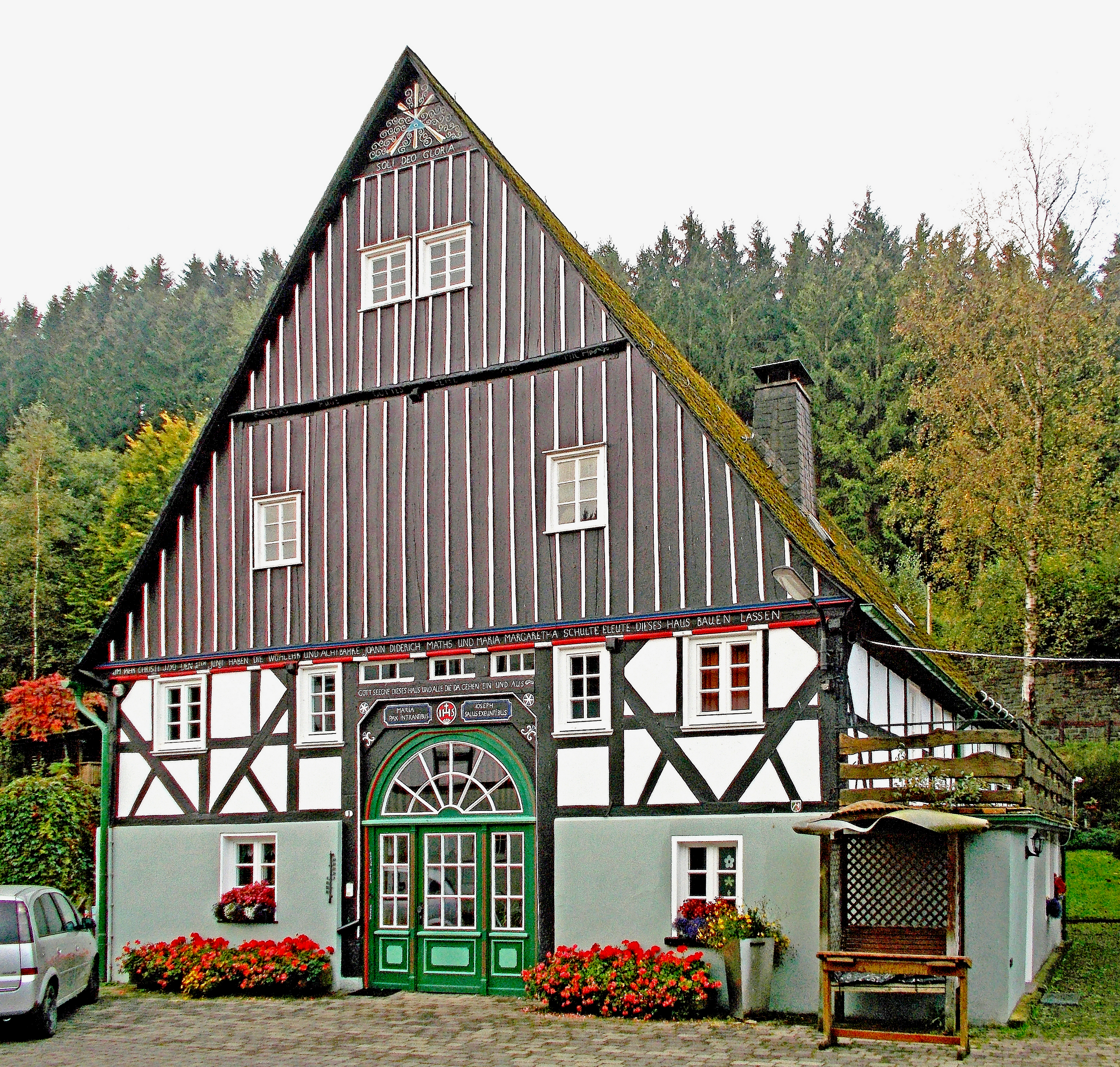 Fachwerkhaupthaus des Hofes in Eslohe-Sallinghausen